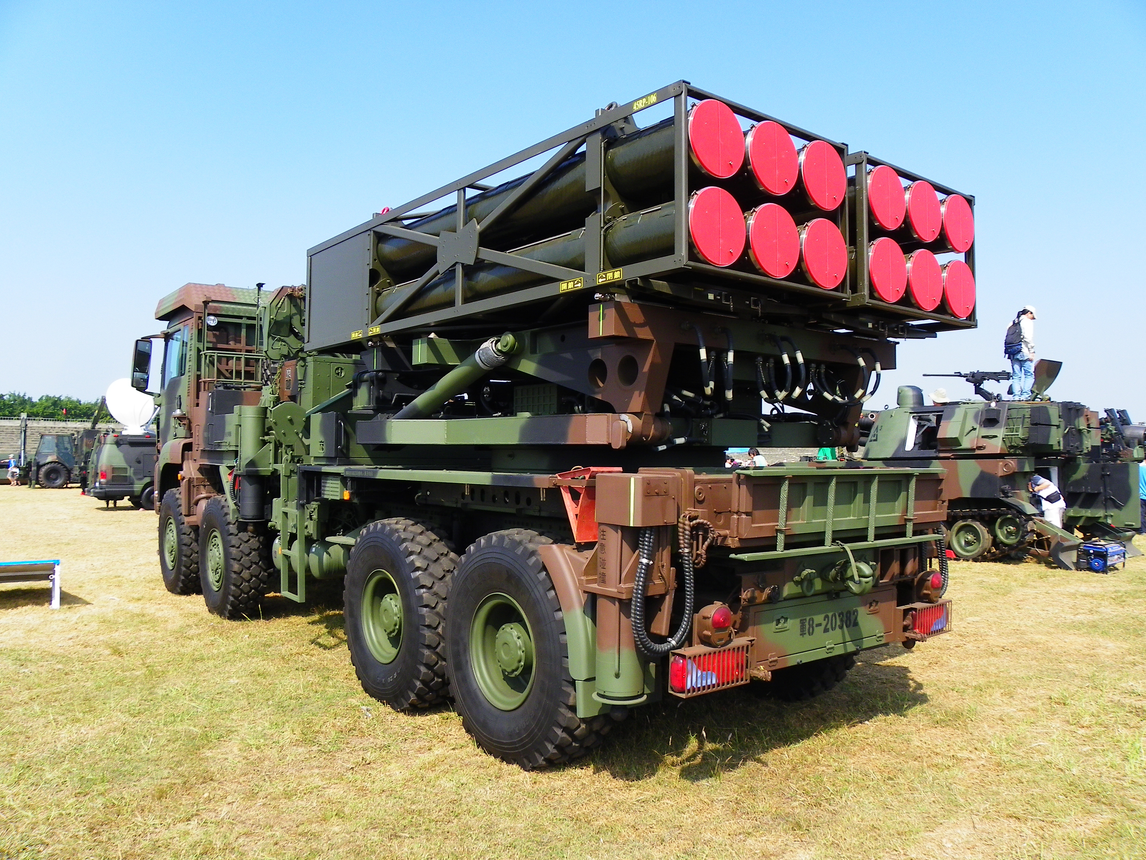 左後方所見雷霆2000多管火箭系統尾部。